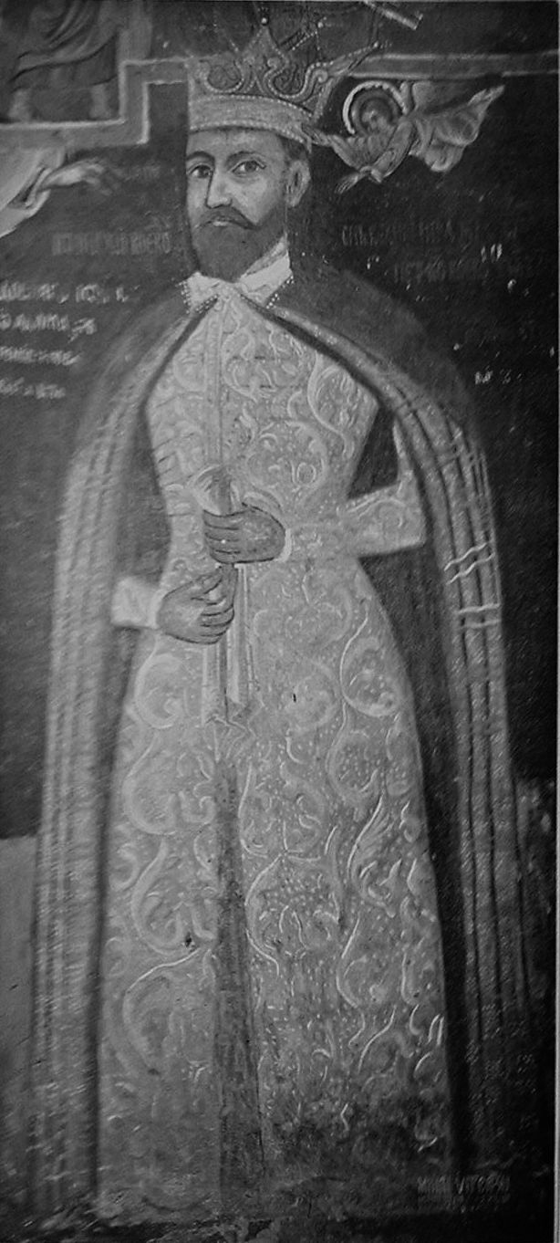 Mihai Viteazul at Căluiul monastery